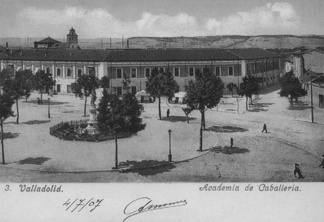 Academia de Caballería - Valladolid - Colección Valladolid, postales para el Recuerdo, editada por el Diario El Mundo de Valladolid. Antigua Academia de Caballería. - Fotografía. Papel 140 x 90 B/N